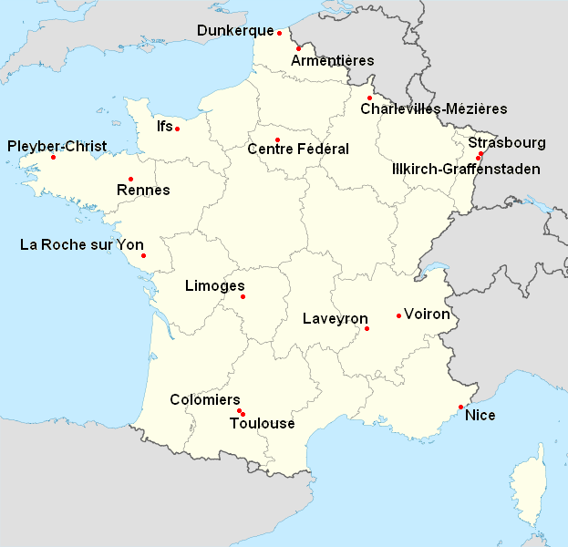 Clubs participants à la Nationale 1 Féminine 2008-2009